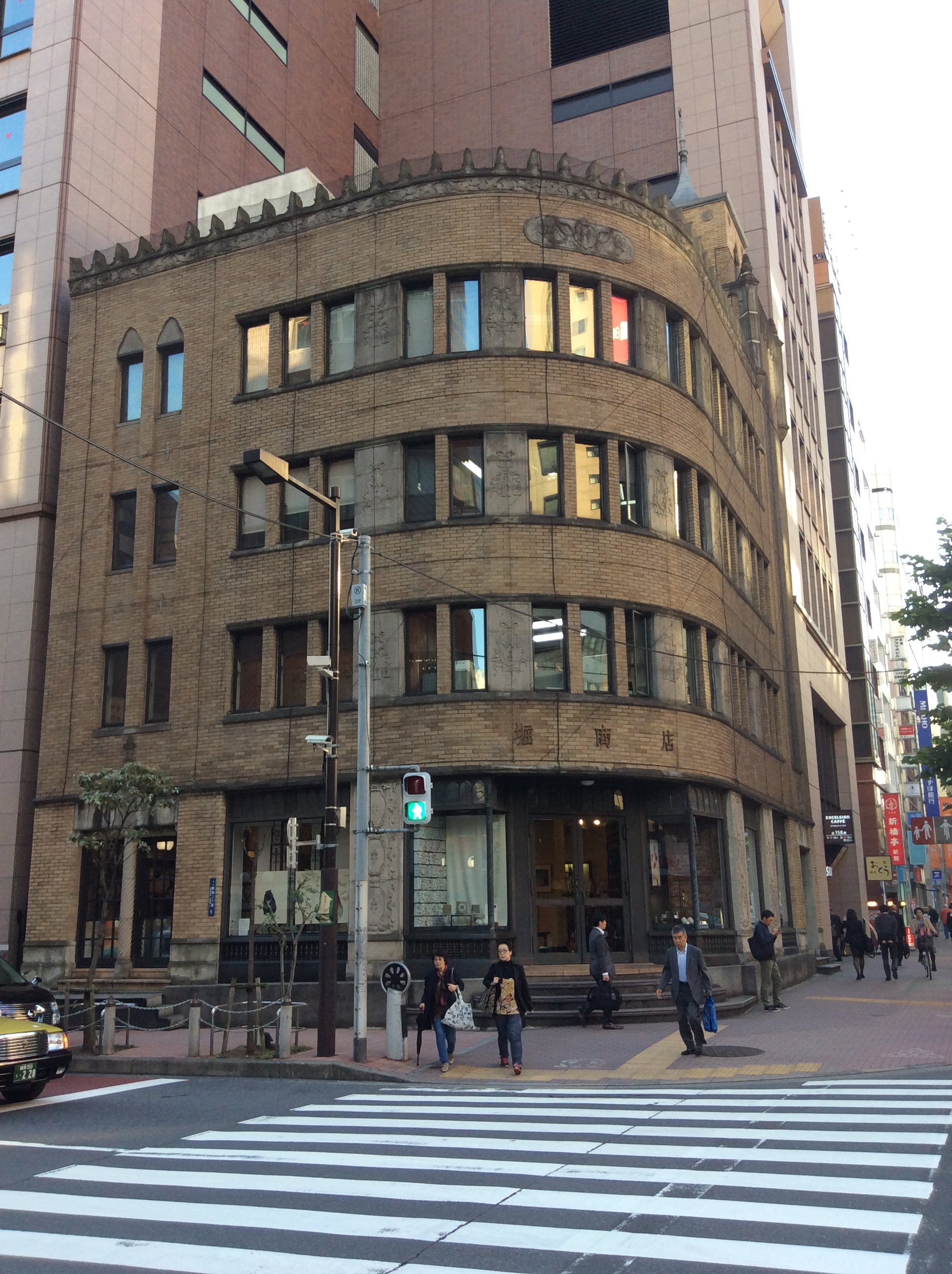 （2015年10月26日撮影）